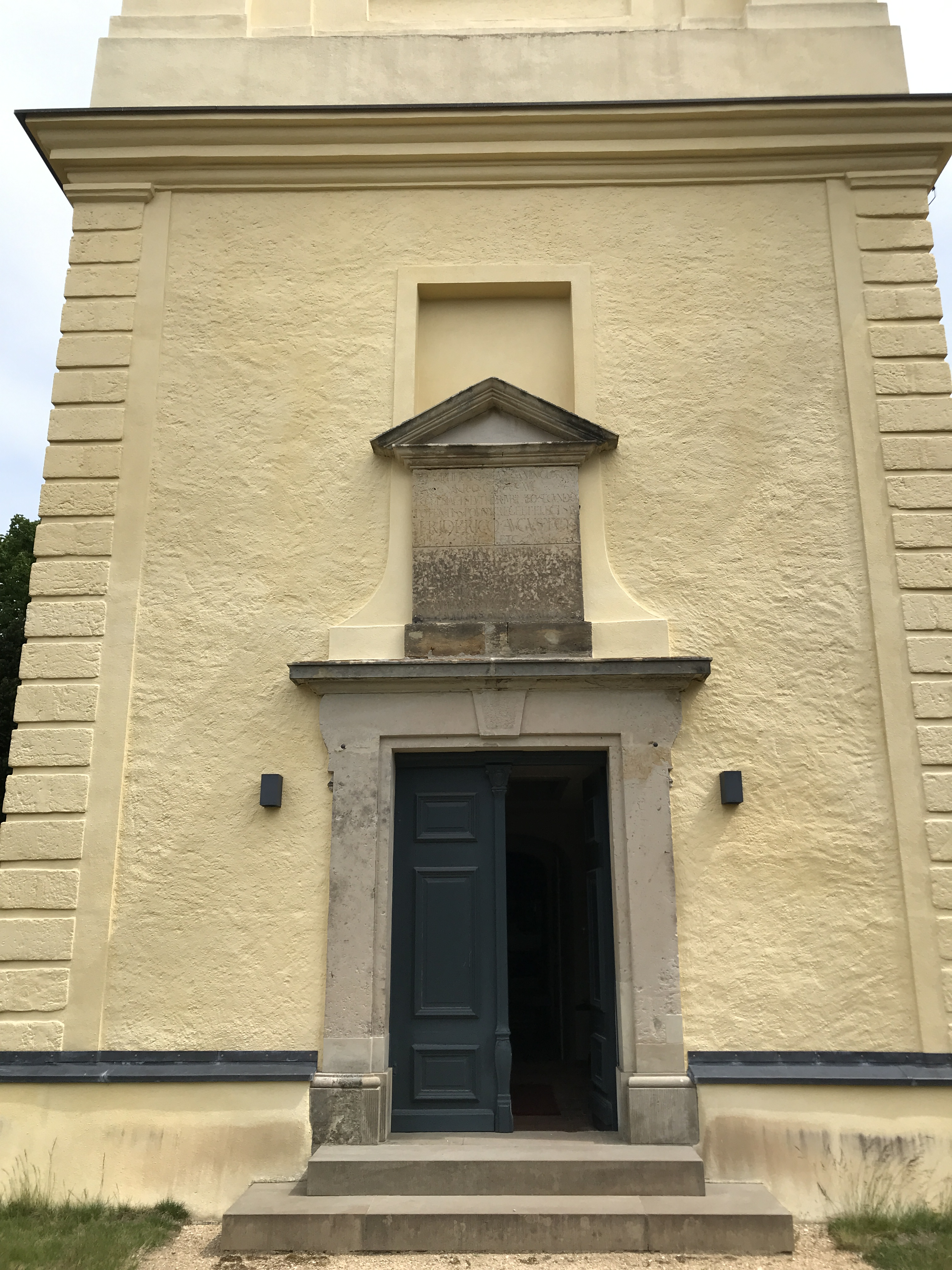 Die Dorfkirche Ahlsdorf ist eine Feldsteinkirche aus dem 14. Jahrhundert in Ahlsdorf, einem Ortsteil der Kleinstadt Schönewalde im Landkreis Elbe-Elster. Der Innenraum ist reich ausgestattet.